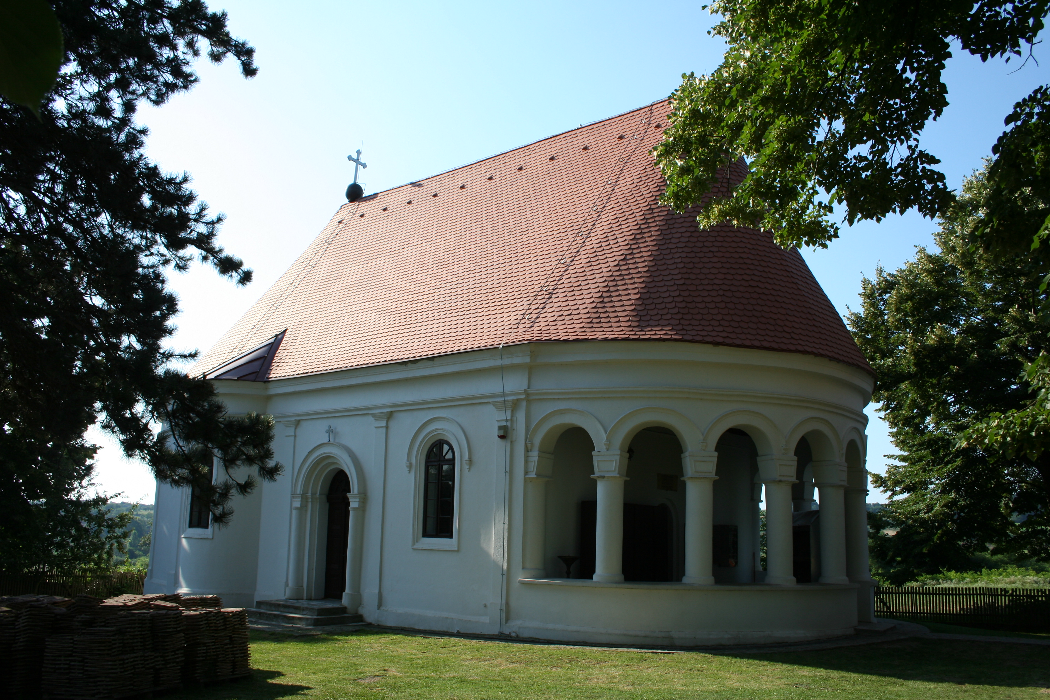 Manastir Sv. Petra i Pavla, Dobrić